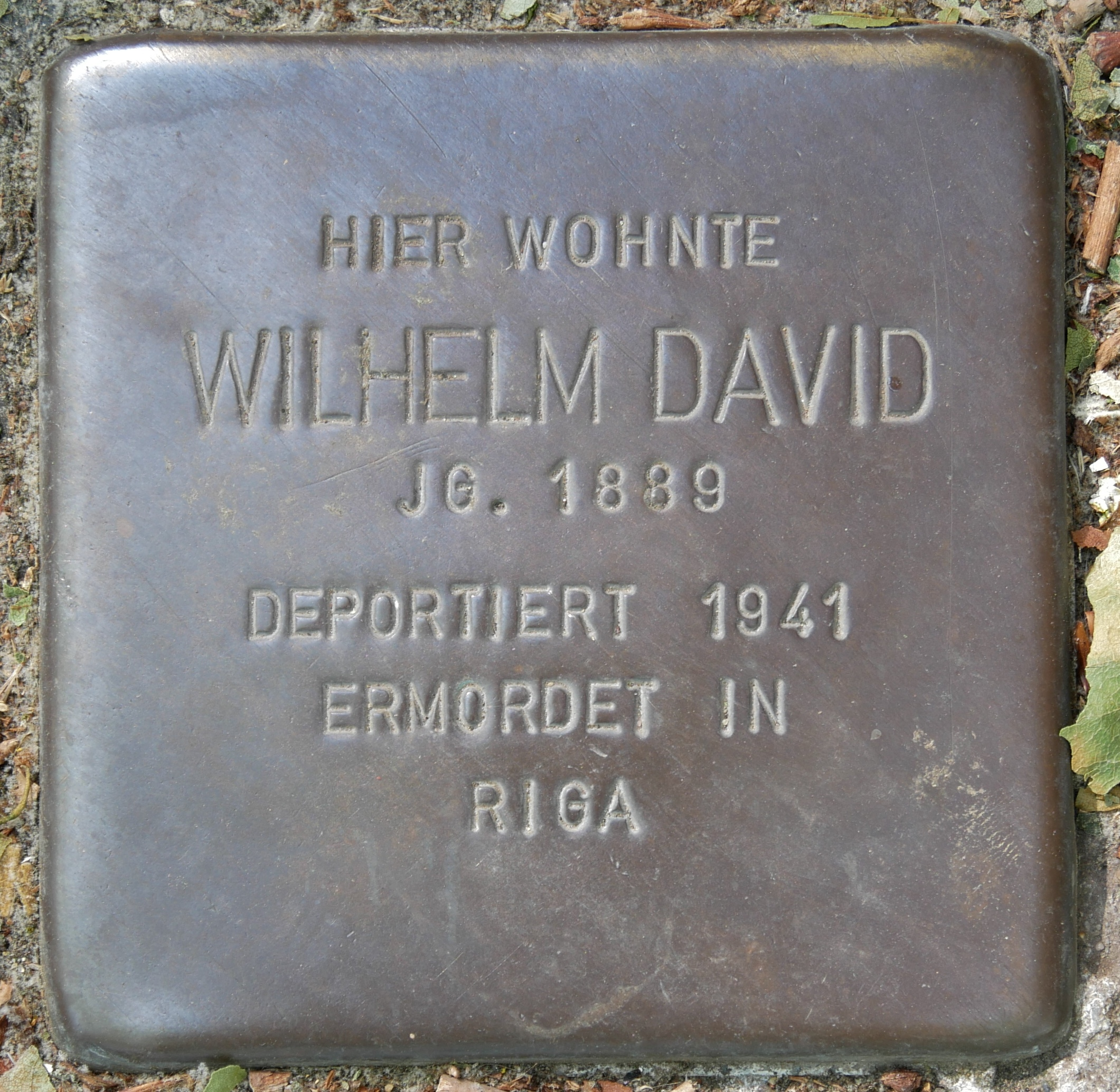 Stolpersteine Wesel: David, Wilhelm